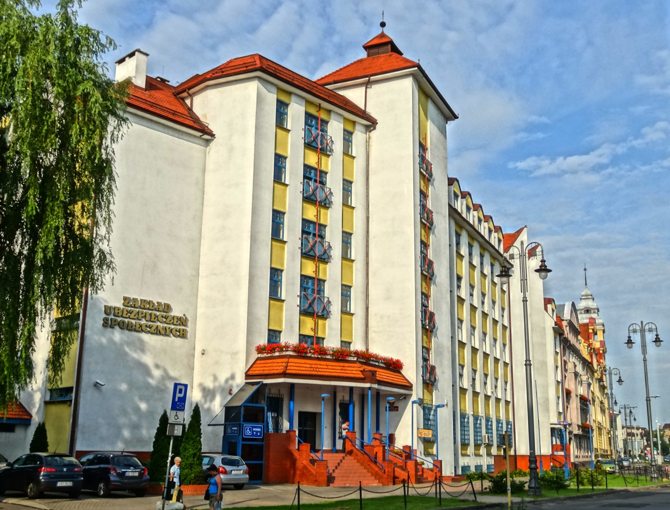 Budynek oddziału ZUS w Bydgoszczy, ul. Świętej Trójcy 33